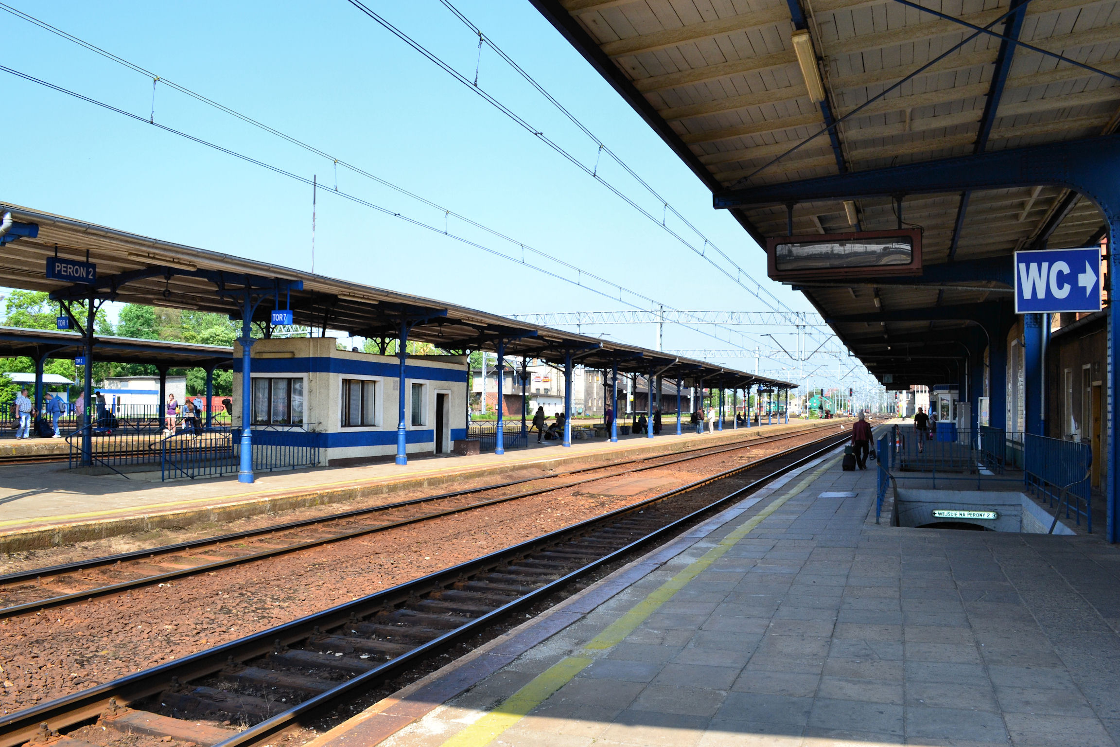 Dworzec kolejowy w Stargardzie Szczecińskim